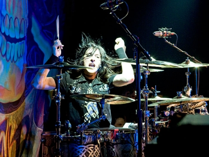 Un baterista profesional, tocando en vivo.